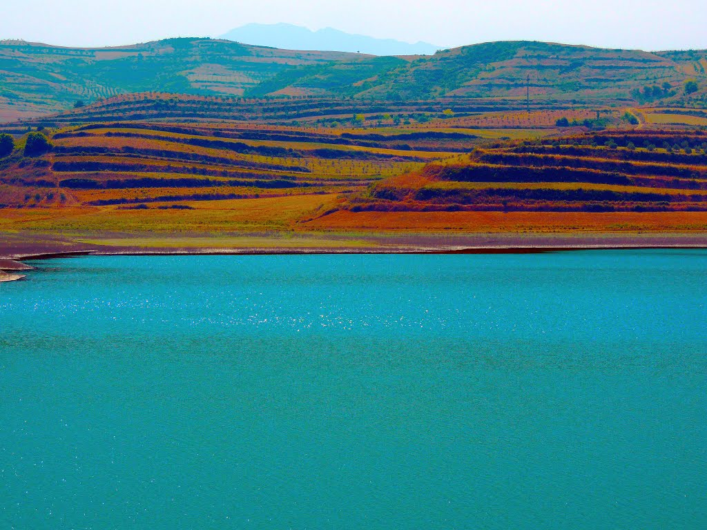 Shqip